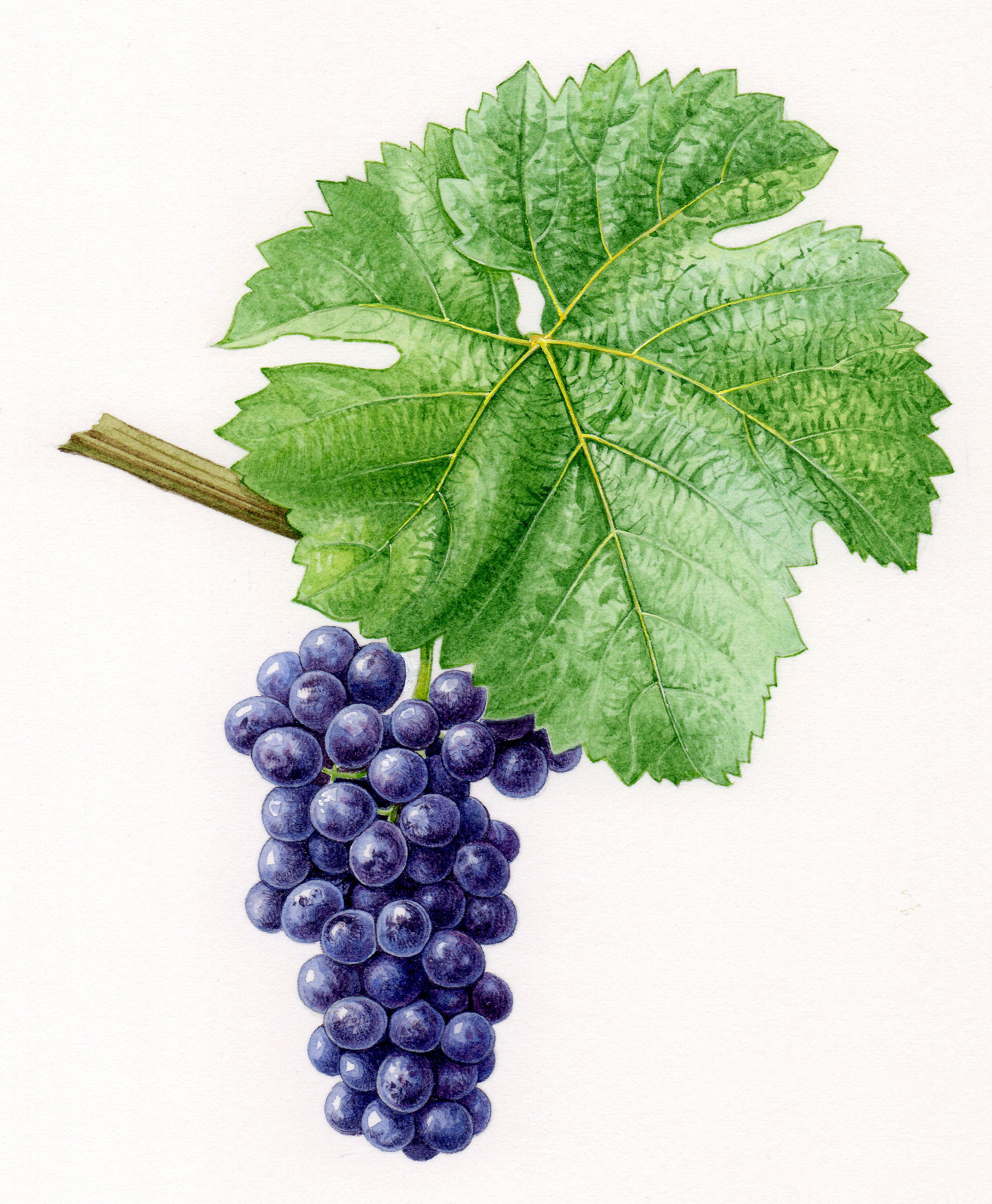 Aquarelles originales pour le Cépages de France (2001)